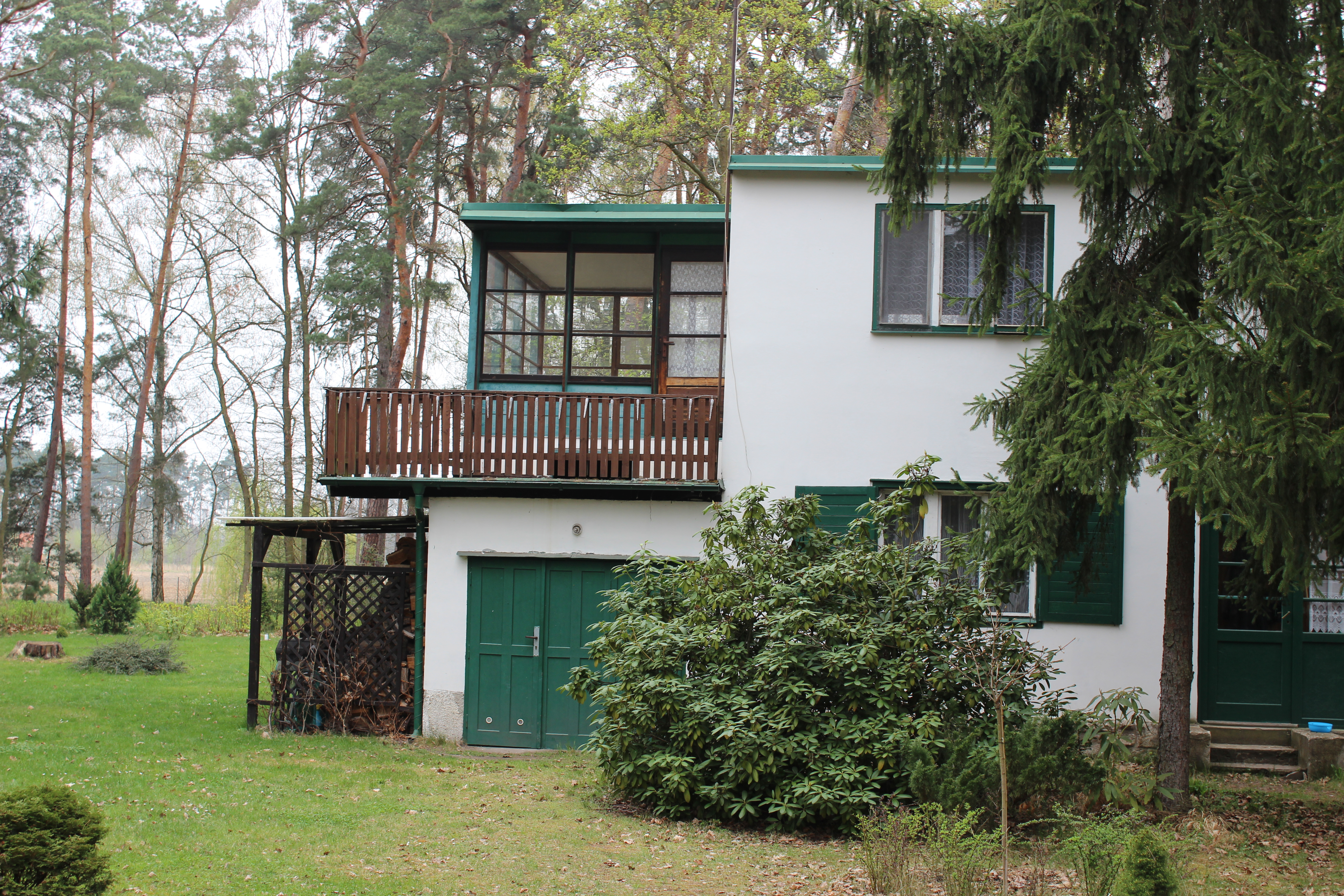 Dům Bohumila Hrabala v Kersku. This photograph was taken with a Canon EOS 600D.